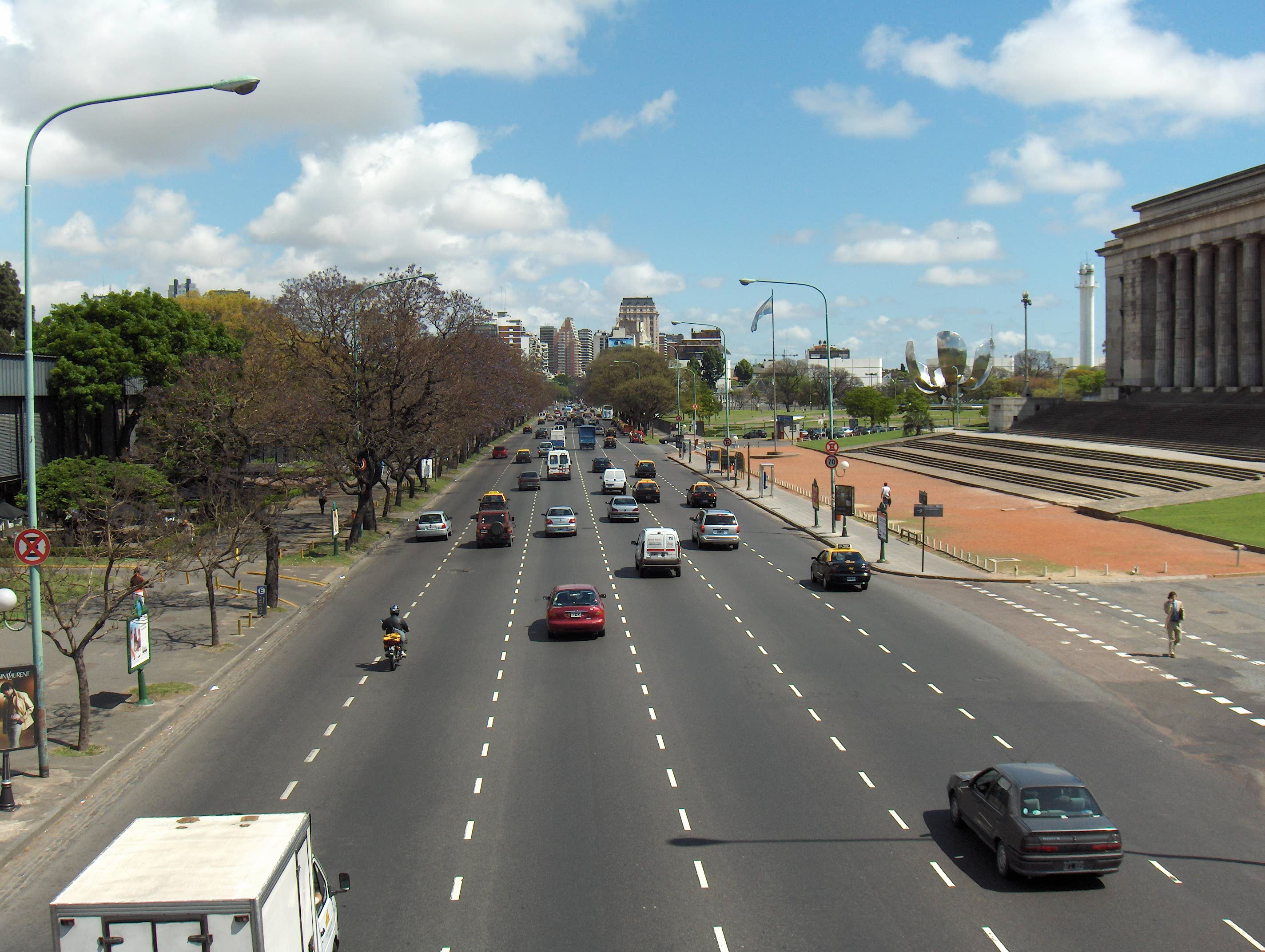 Avenida Figueroa Alcorta, casi en la intersección con la Avenida Pueyrredón. Ciudad de Buenos Aires